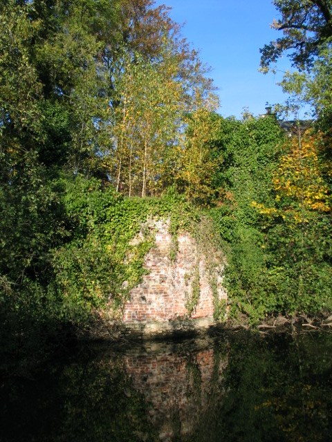 restant van het oude Prinsenhof te Kuringen- eigen foto